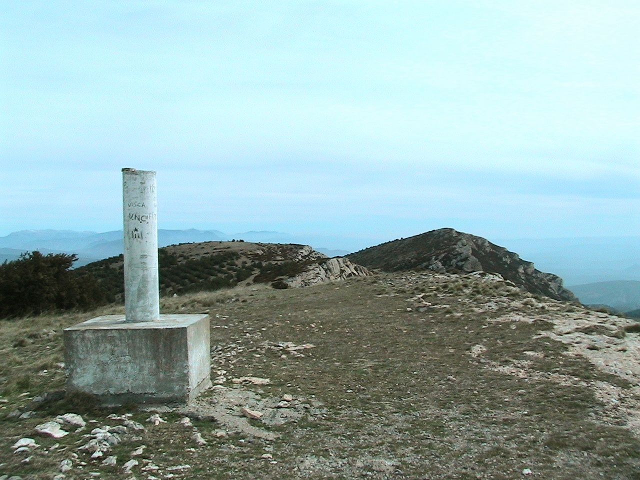 Vèrtex geodèsic al Tossal de les Torretes, al Montsec de Rúbies (Pallars Jussà - Catalunya)